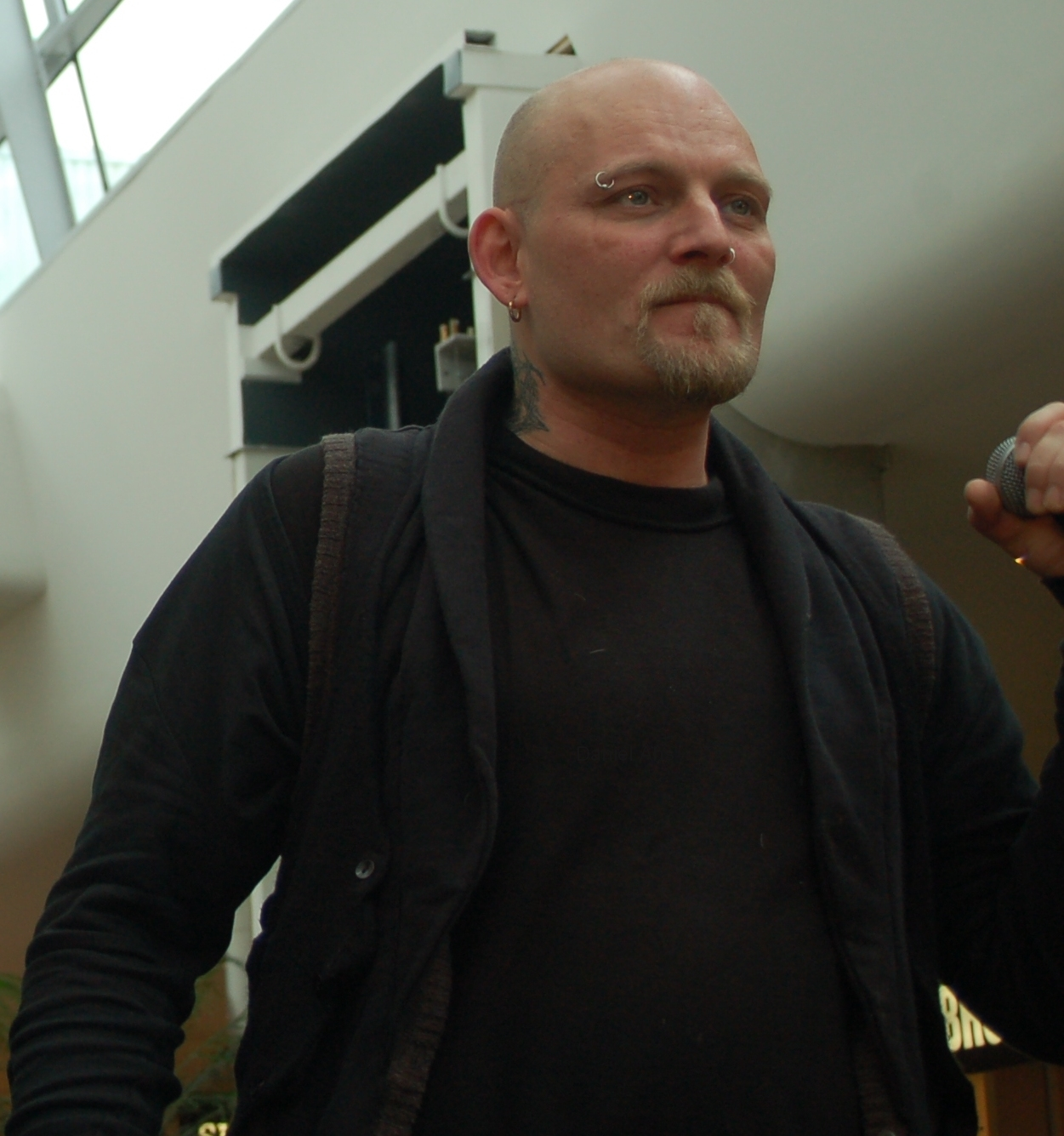 Håkan Hemlin, Nordman.